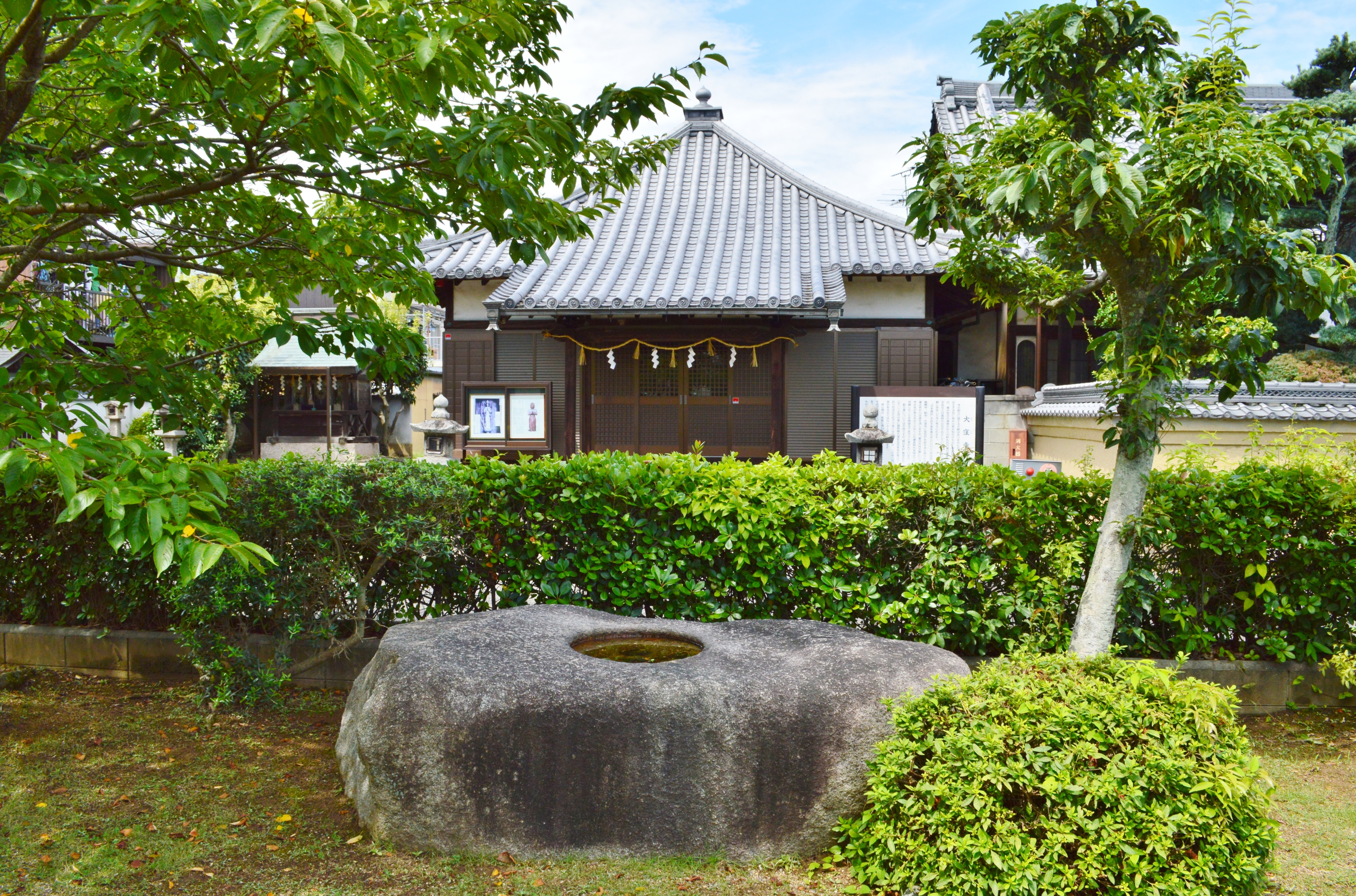 大窪寺跡塔心礎と国源寺観音堂